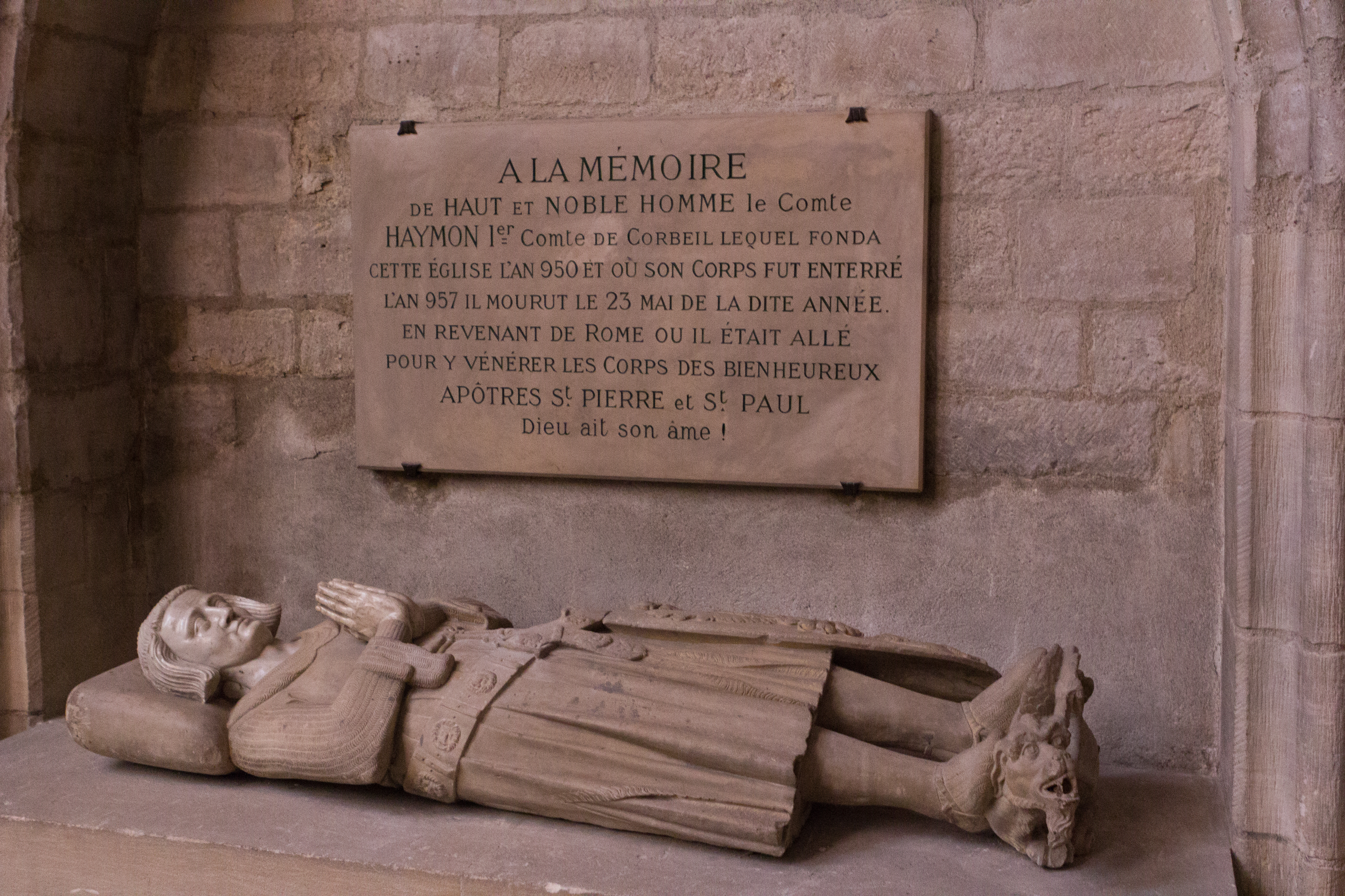 Gisant du comte Haymon - Cathédrale Saint-Spire de Corbeil-Essonnes, Corbeil-Essonnes, Essone, France